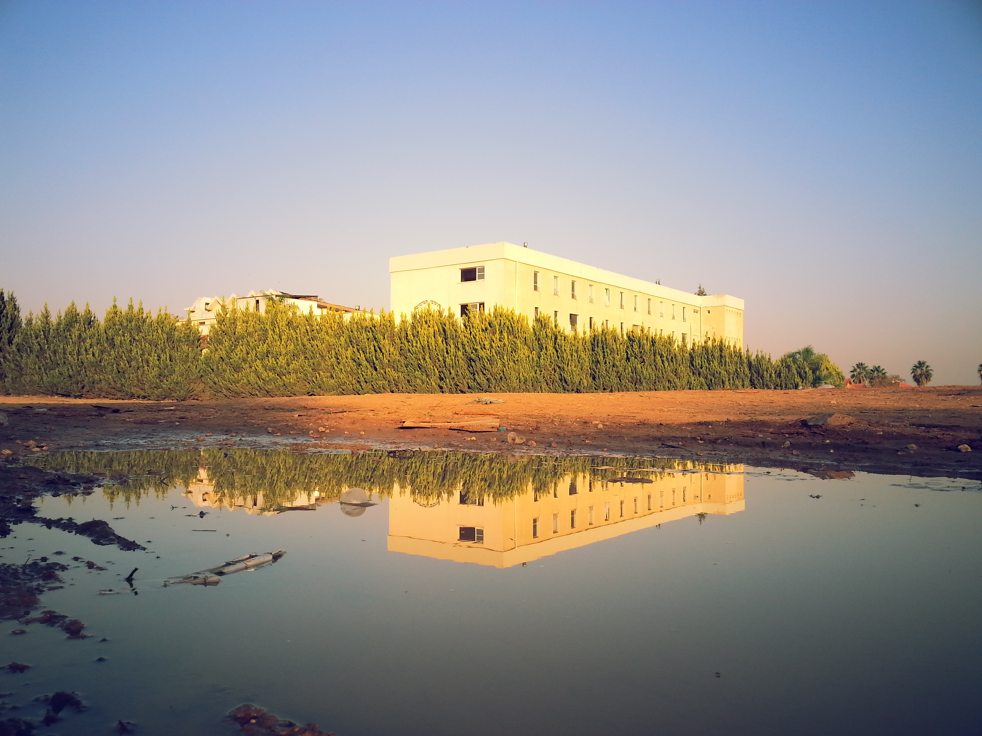 ישיבת תומכי תמימים המרכזית - כפר חבד